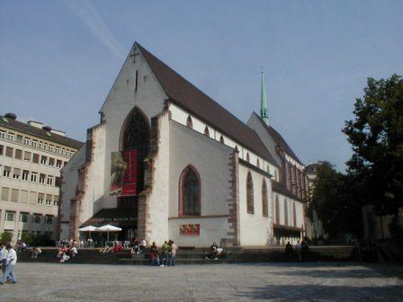 Barfüsserkirche